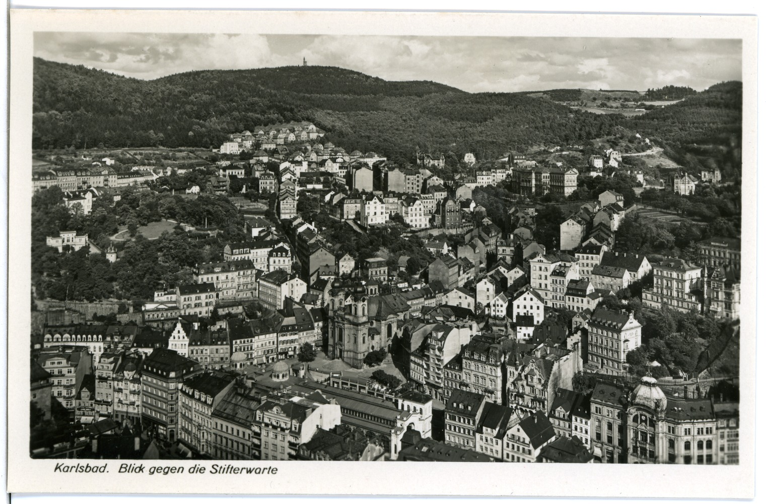 Karlsbad; Blick gegen die Stifterwarte This postcard is from publisher Brück & Sohn in Meißen ( postcard has a unique number 25514 and is available in a higher resolution at the publisher. This images was uploaded in a cooperation project between Wikipedians and the publisher.